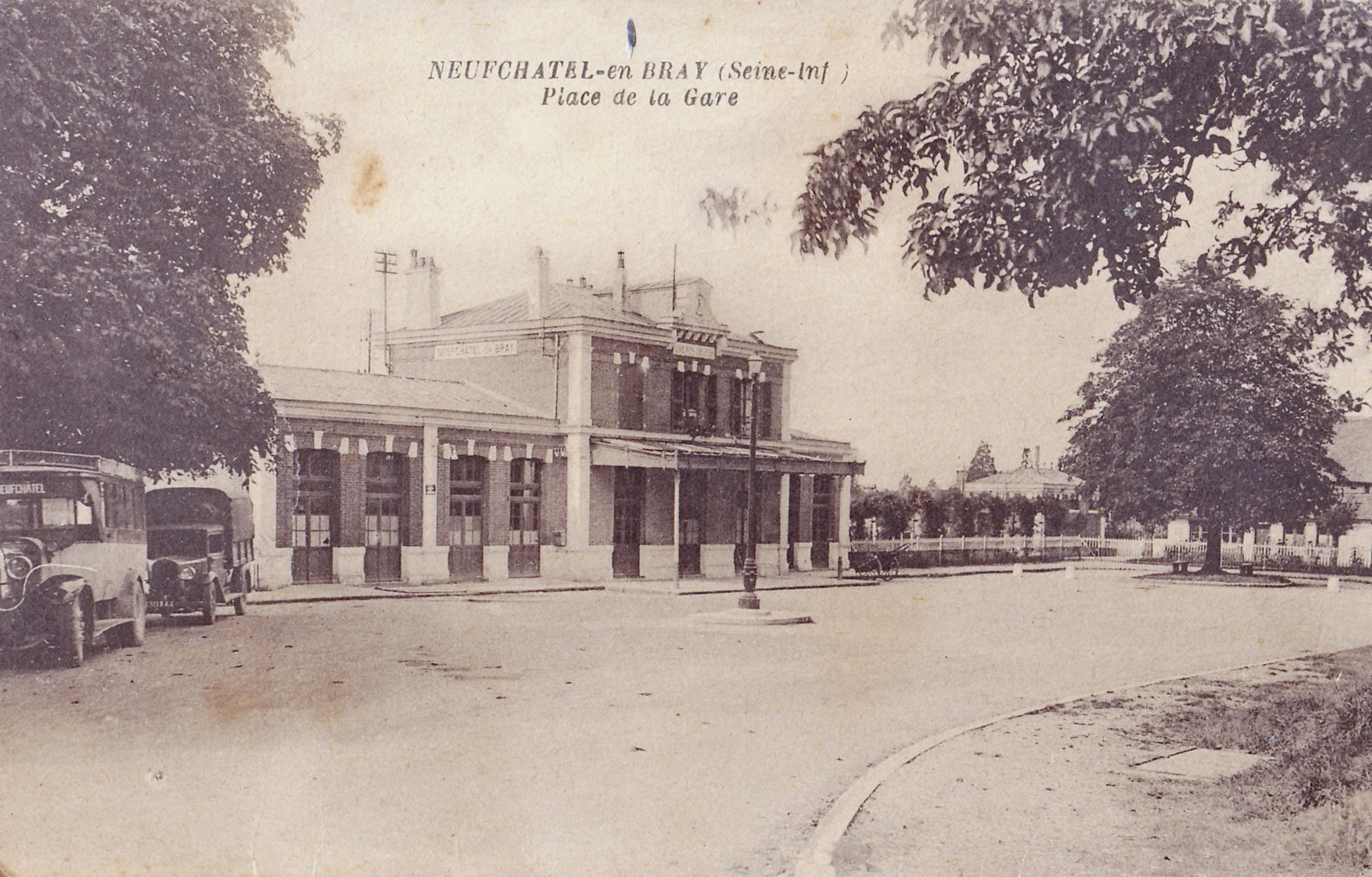 Carte postale ancienne éditée par Caignard et Gorin :NEUFCHATEL - Place de la Gare